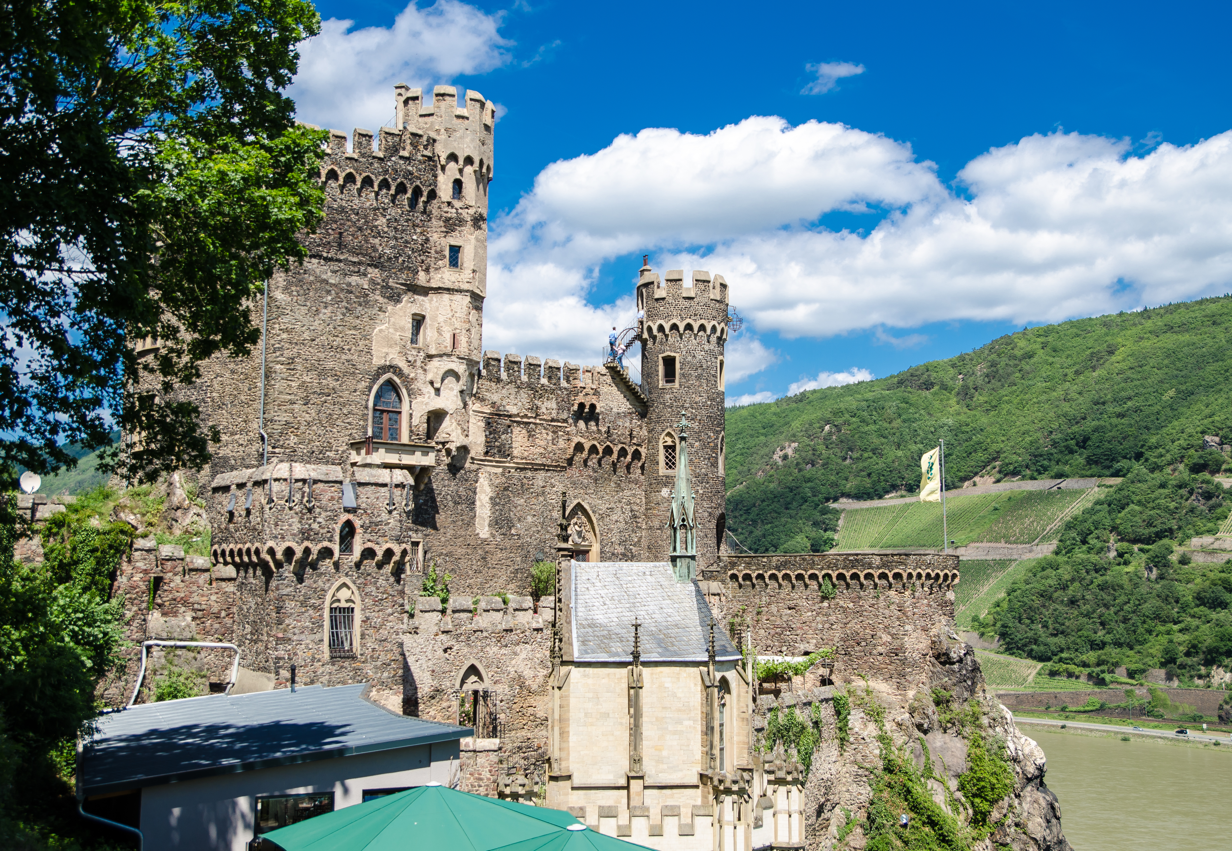 Burg Rheinstein von Südosten (Eseslpfad zum Schweizerhaus) aus gesehen